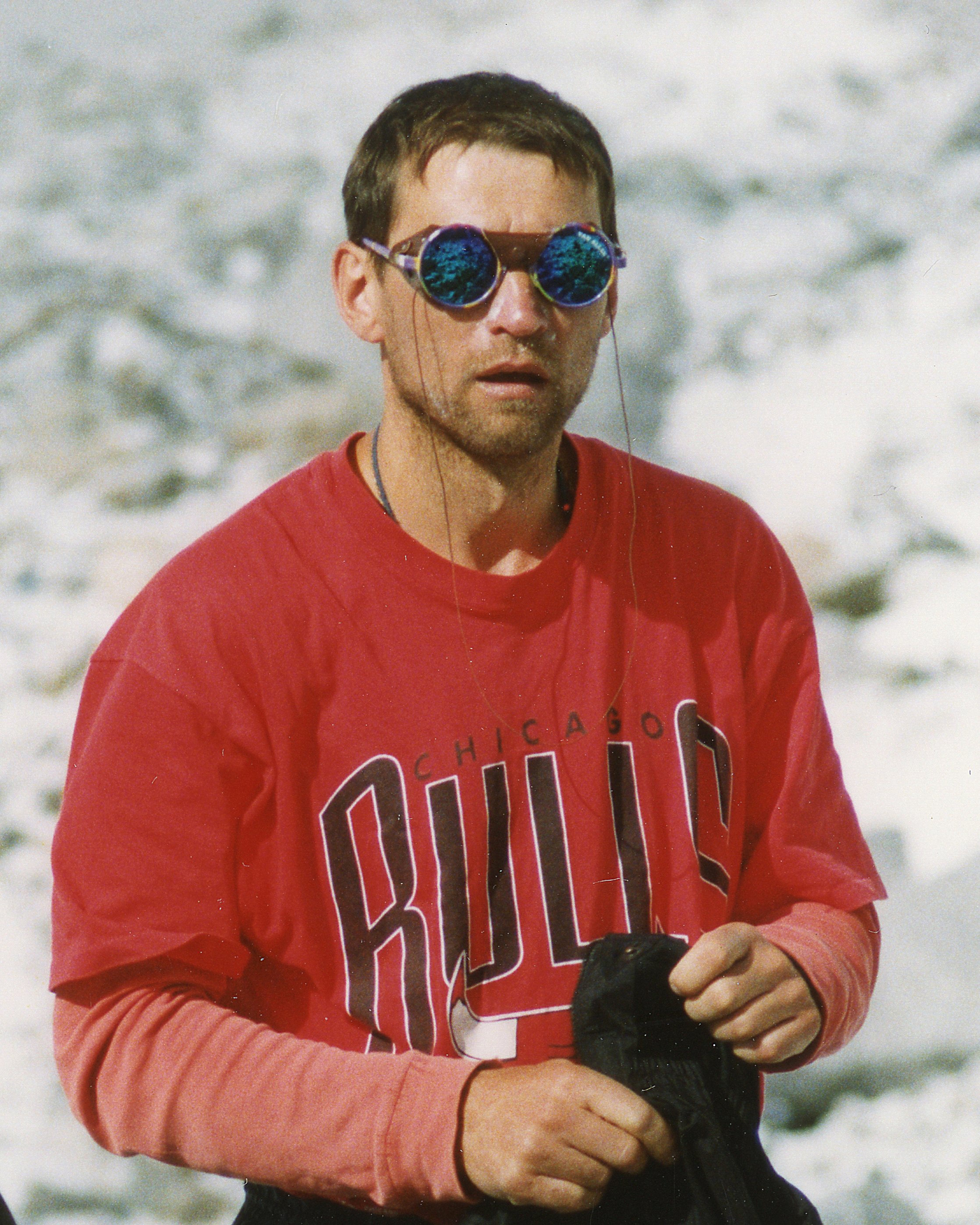 Ivar Lai